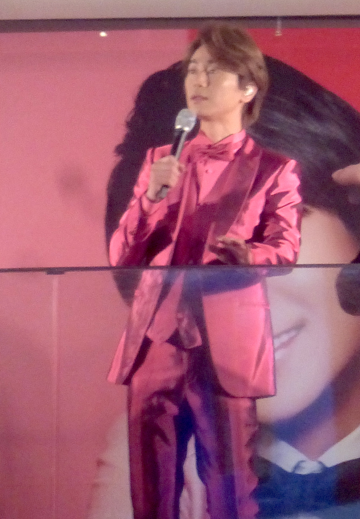 Kiyoshi Hikawa in Shimbashi (氷川きよし、新橋にて)